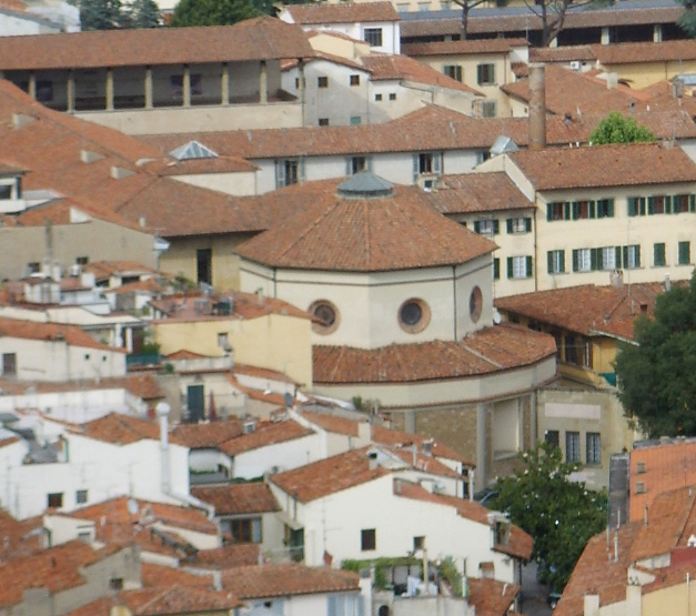 Rotonda del brunelleschi view